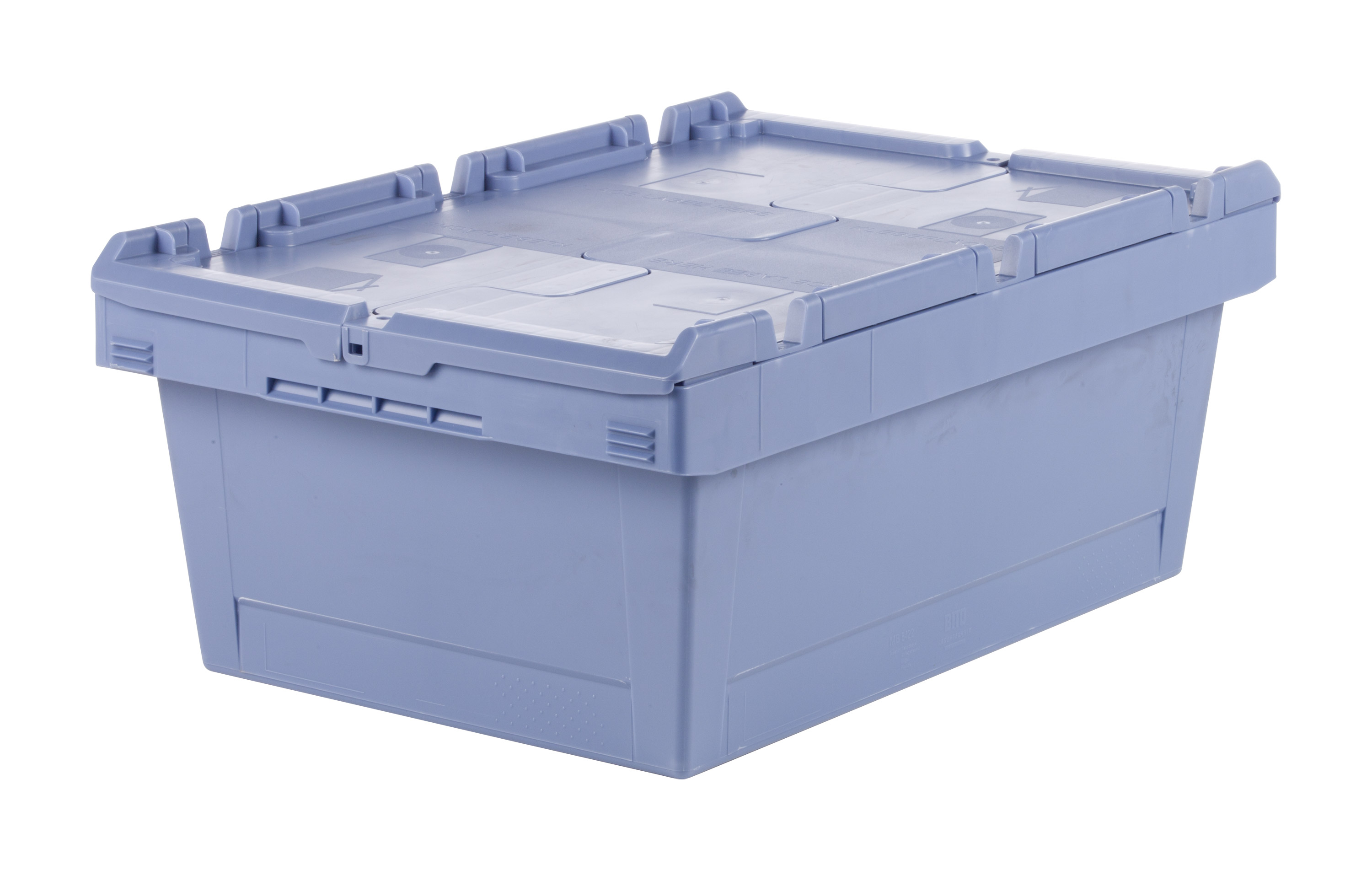 Nestbarer Behälter geschlossen